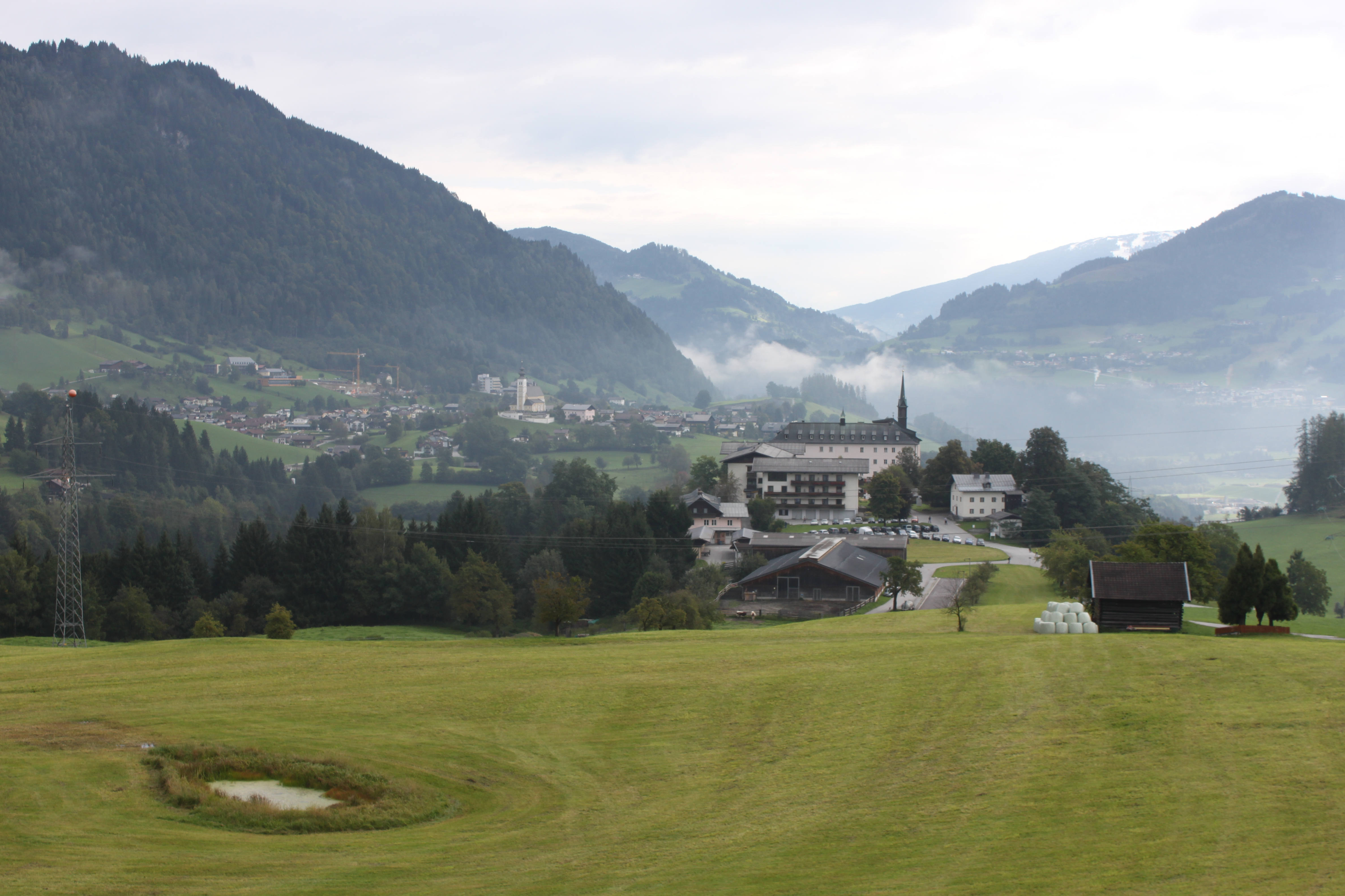 Schloss Schernberg mit Blick auf Sankt Veit im Pongau